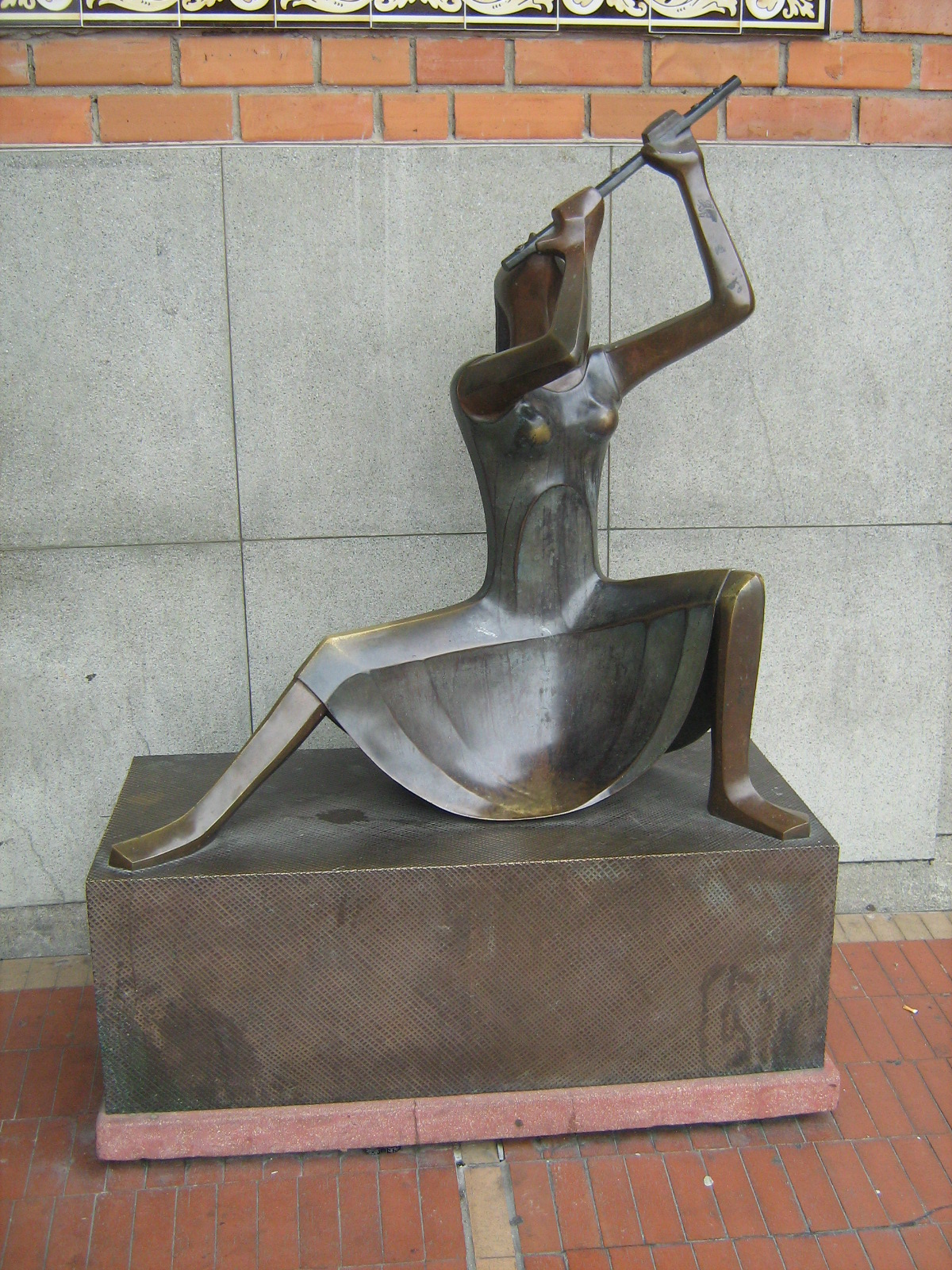 La Dama Flauta del Maestro Salvador Arango, ubicada en el Centro Administrativo Municipal de Itagüí -CAMI-. Colombia.